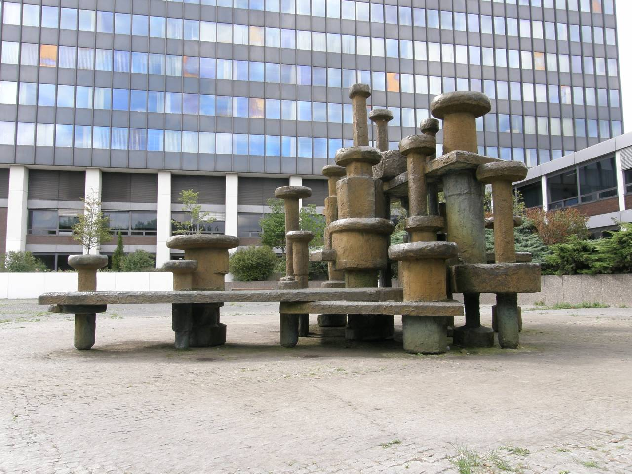 Gottfried Gruner: Springbrunnen. 1972, Bronze. Hallesches Ufer Ecke Großbeerenstraße vor dem Gebäude der Deutschen Post (ehemals Postscheckamt).